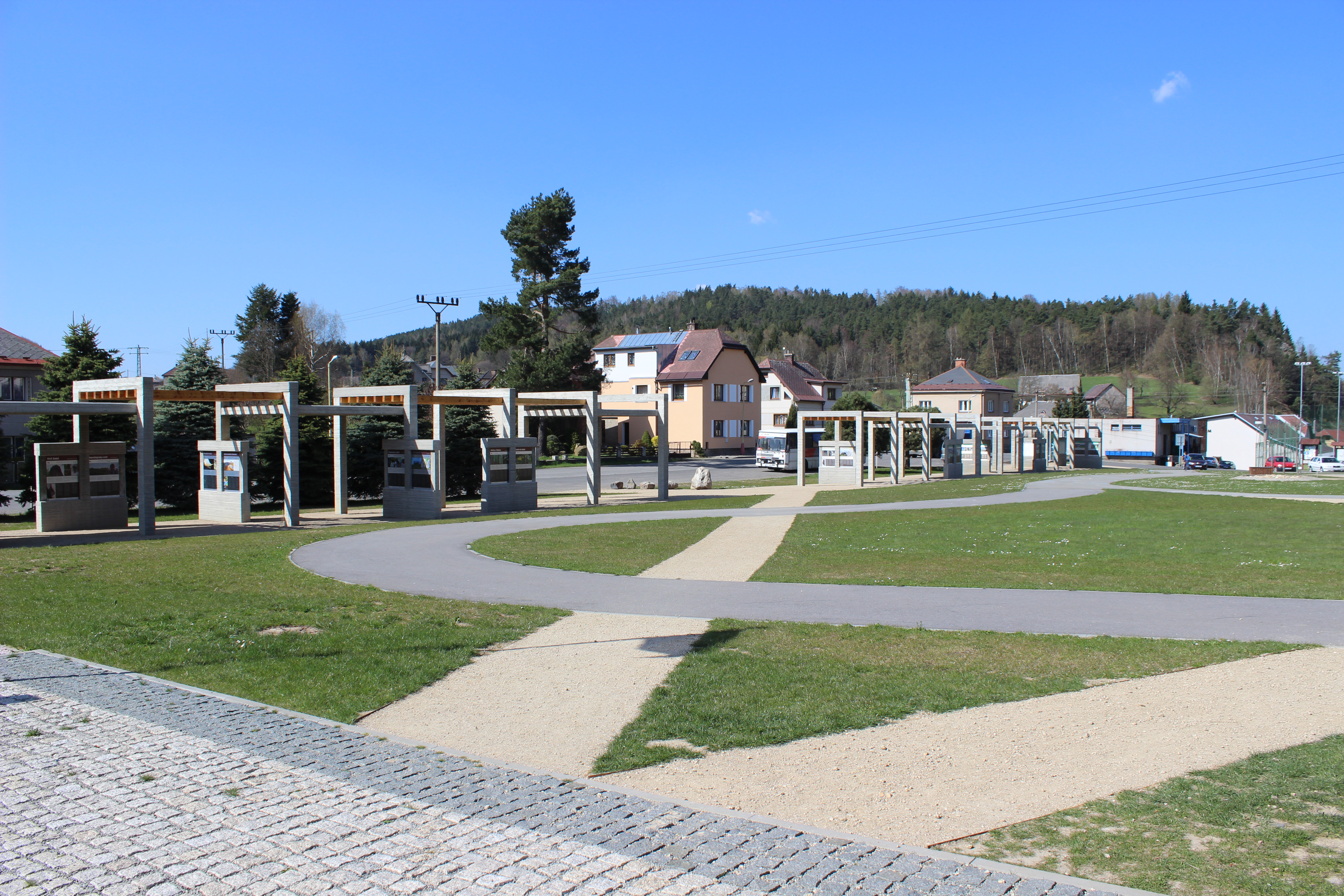 Umělé podloubí na návsi v Koberově, části okresu Jablonec nad Nisou.